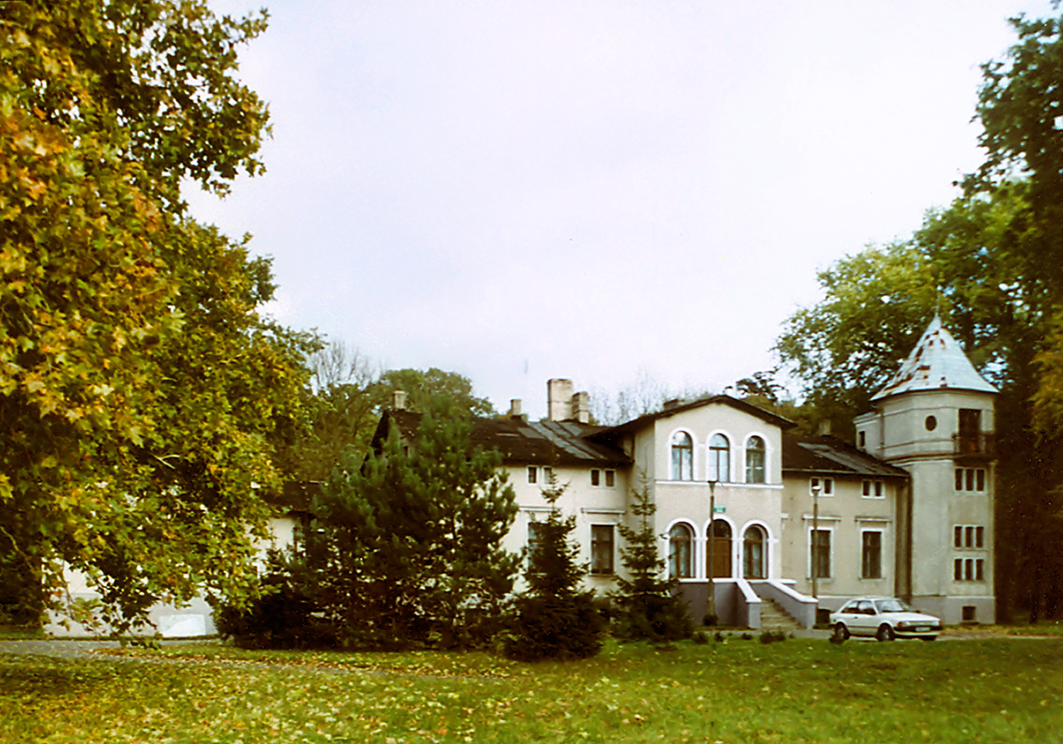 Uchorowo, dwór (Uchorowo, mansion)